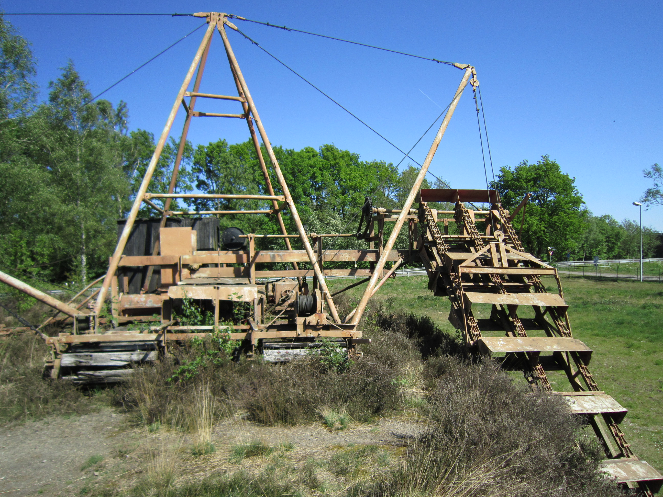 Hochmoorkante mit Abbaugerät im Emsland Moor Museum Groß-Hesepe